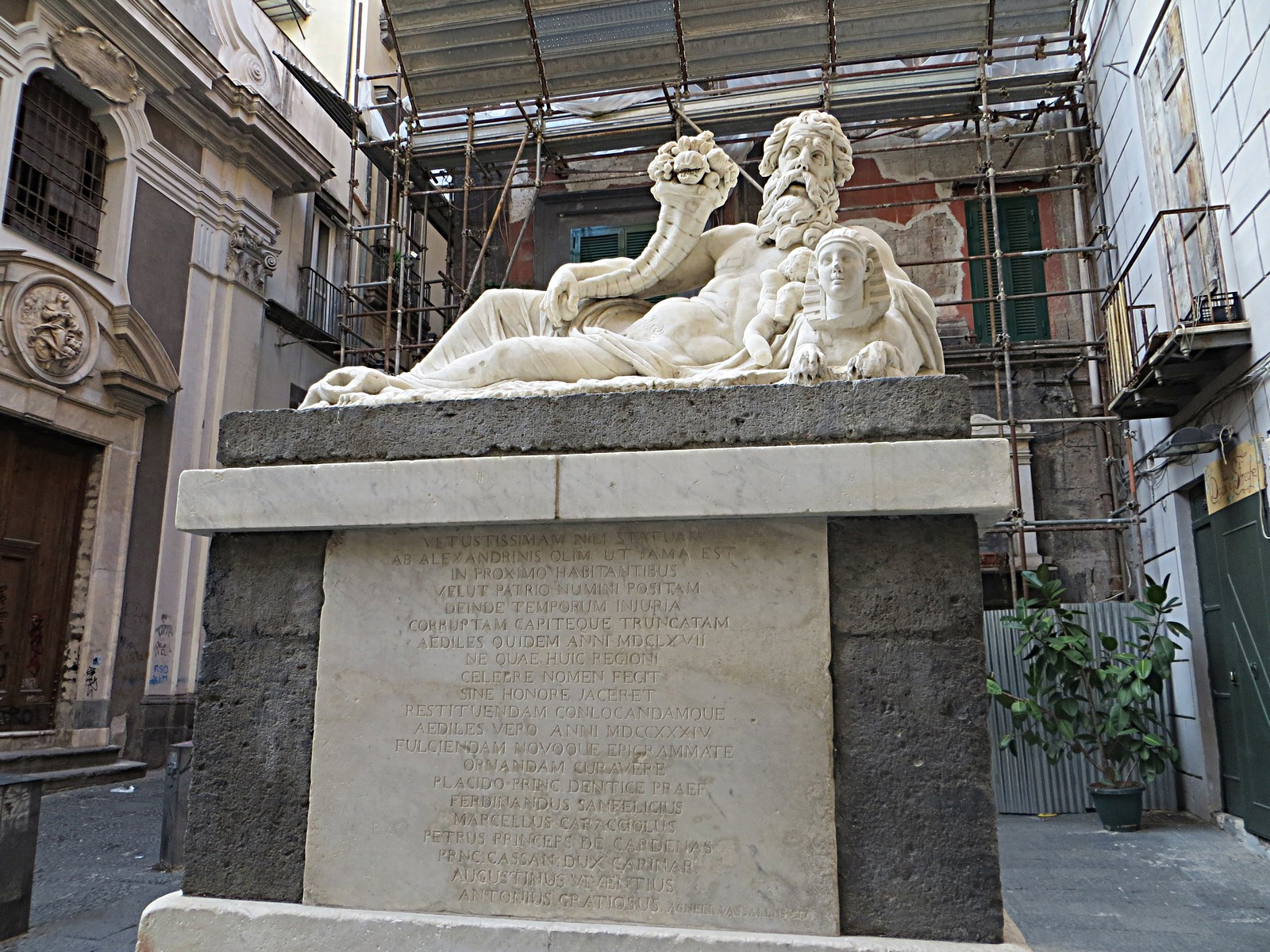 Statua del dio Nilo